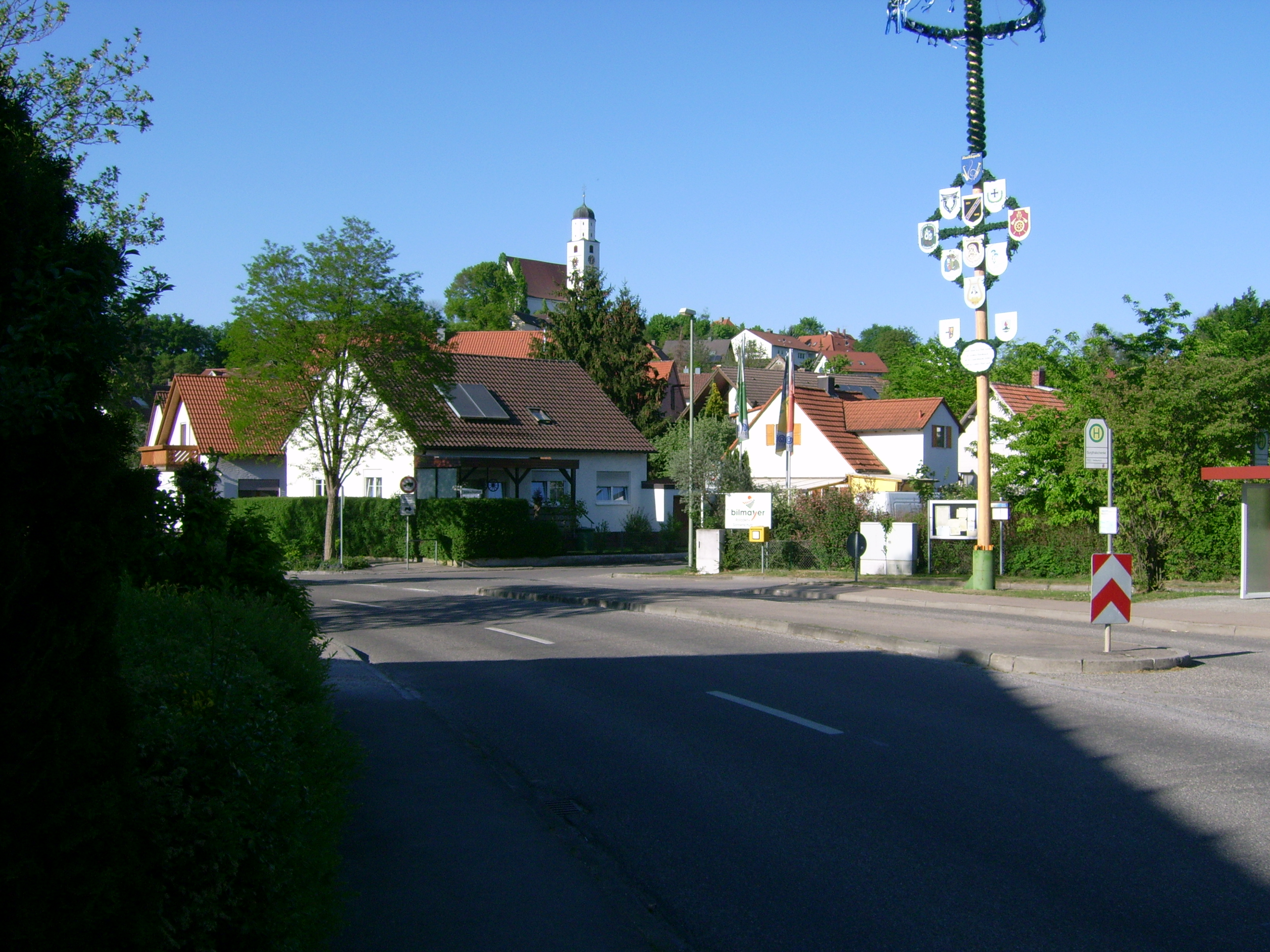 Stadtteil Illerberg von Thal aus gesehen